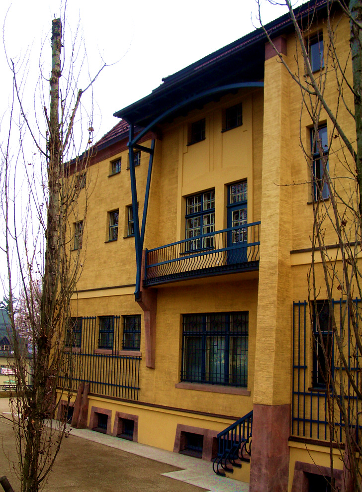 Chemnitz, Germany: Villa Esche by Henry van de Velde; side view